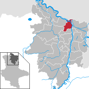 Werben (Elbe) im Landkreis Stendal, Sachsen-Anhalt